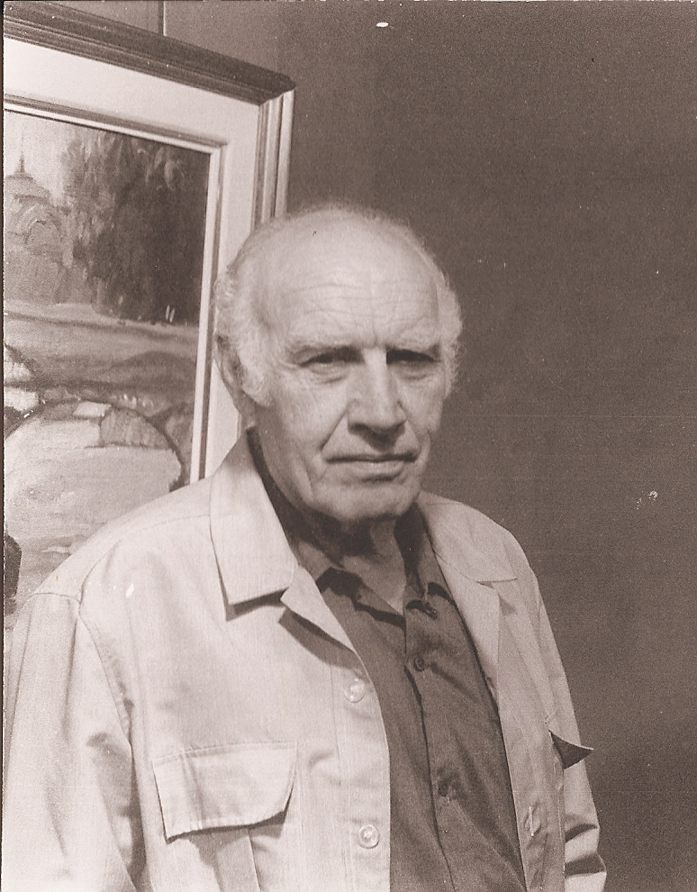 Augusto Torres en la Sala Dalmau de Barcelona, 1980.